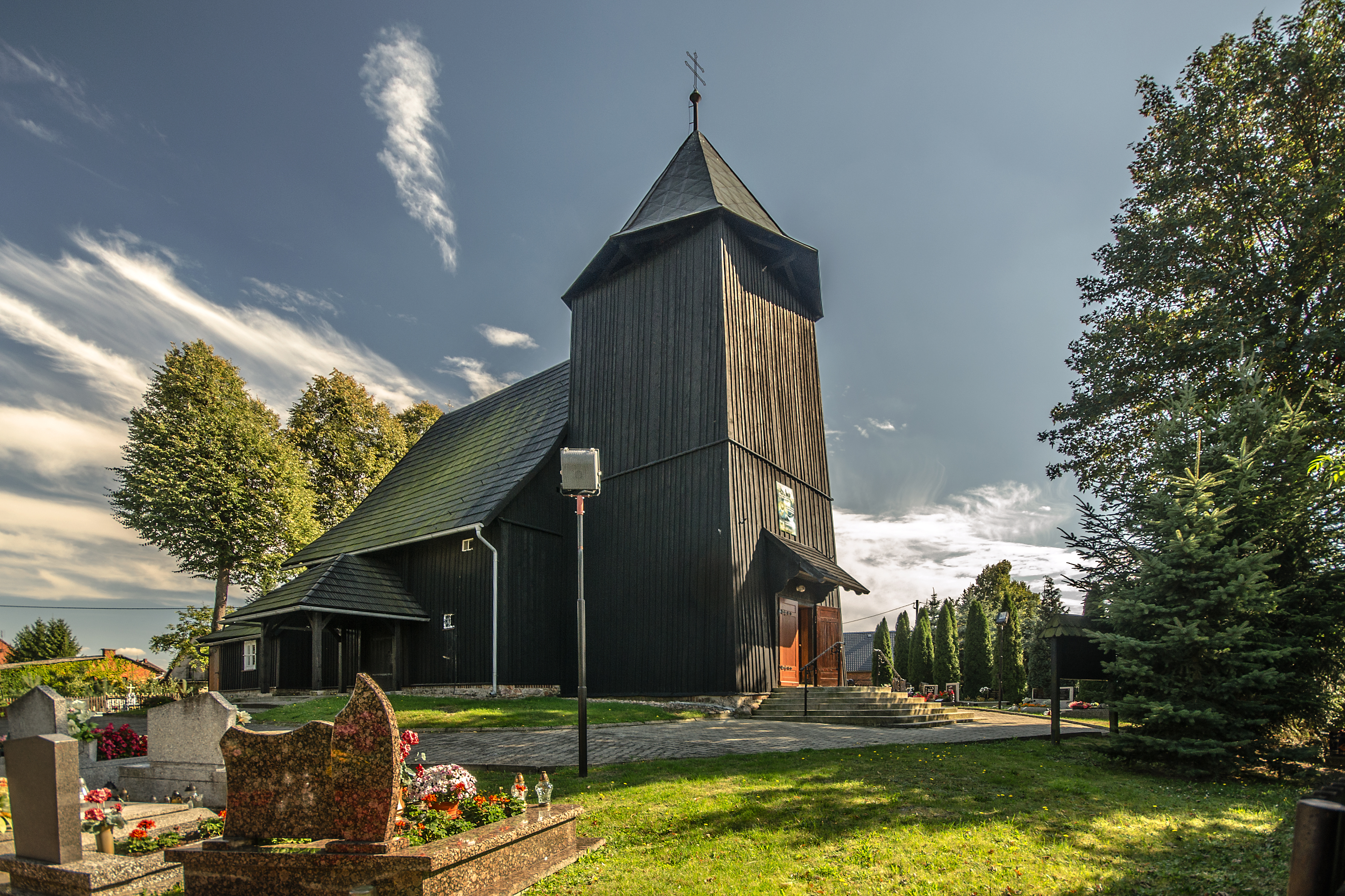 Boroszów, kościół fil. pw. św. Marii Magdaleny, 2 poł. XVII